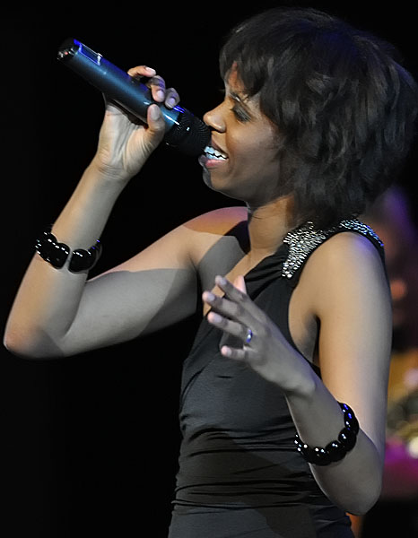 Kellylee Evans, canadian jazz vocalist, 2011